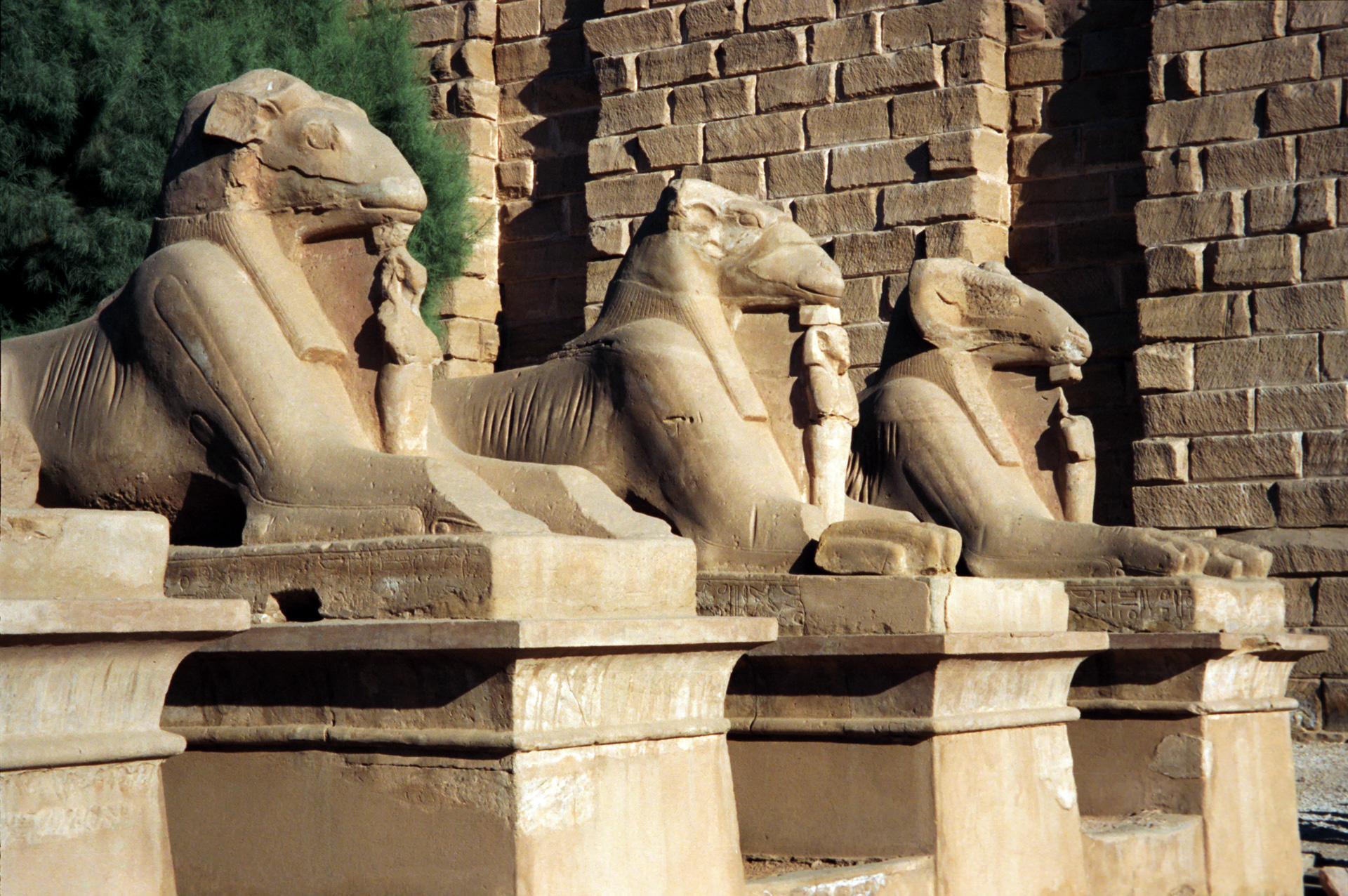 Karnak temple complex